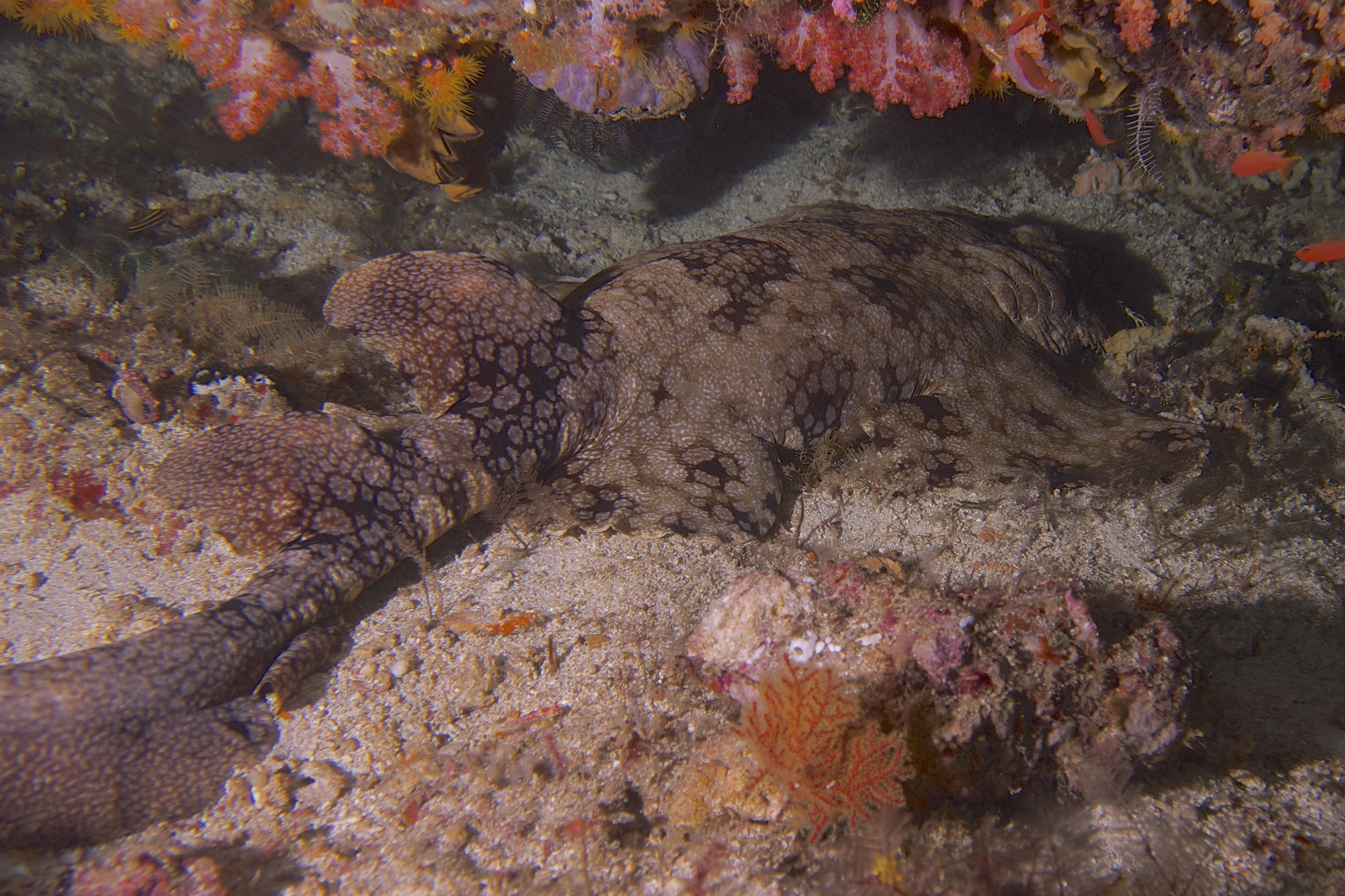 Eucrossorhinus dasypogon